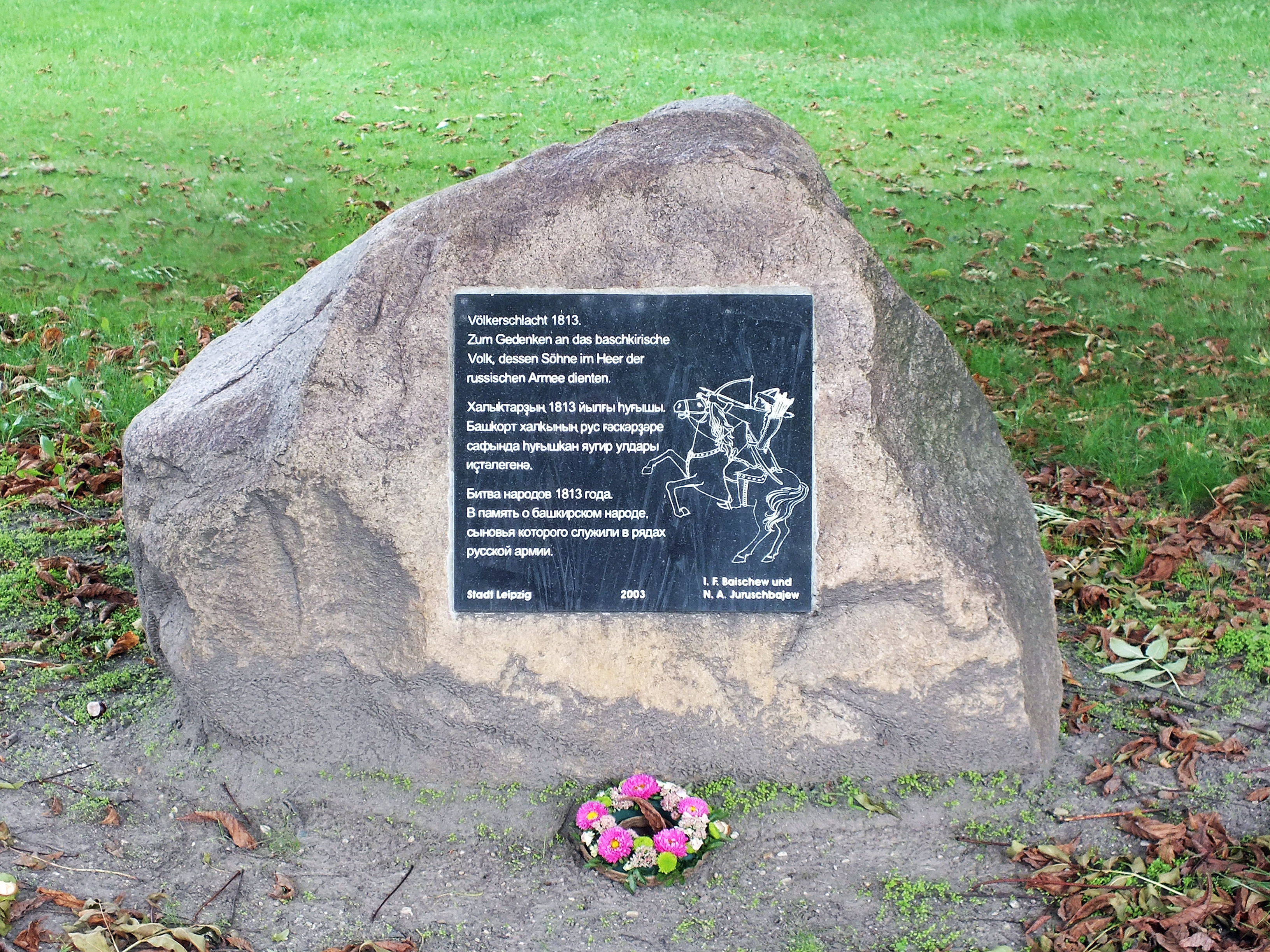 Gedenkstein für die an der Völkerschlacht bei Leipzig beteiligten Baschkiren